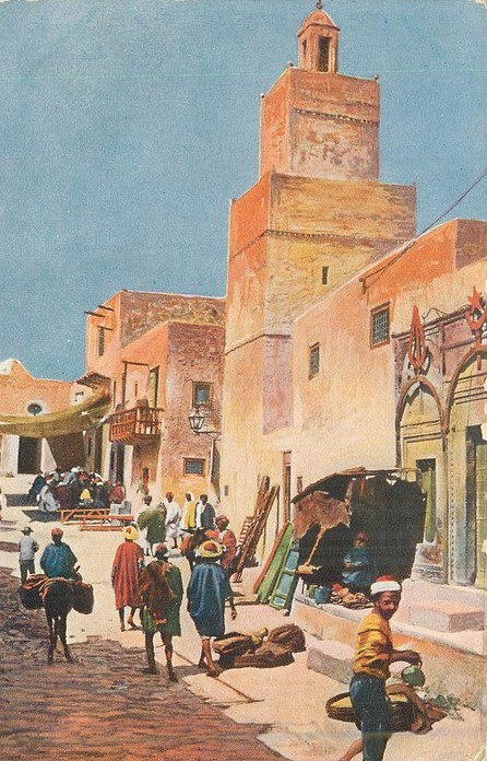 Mosquée Ajouzine près de Bab Diwan